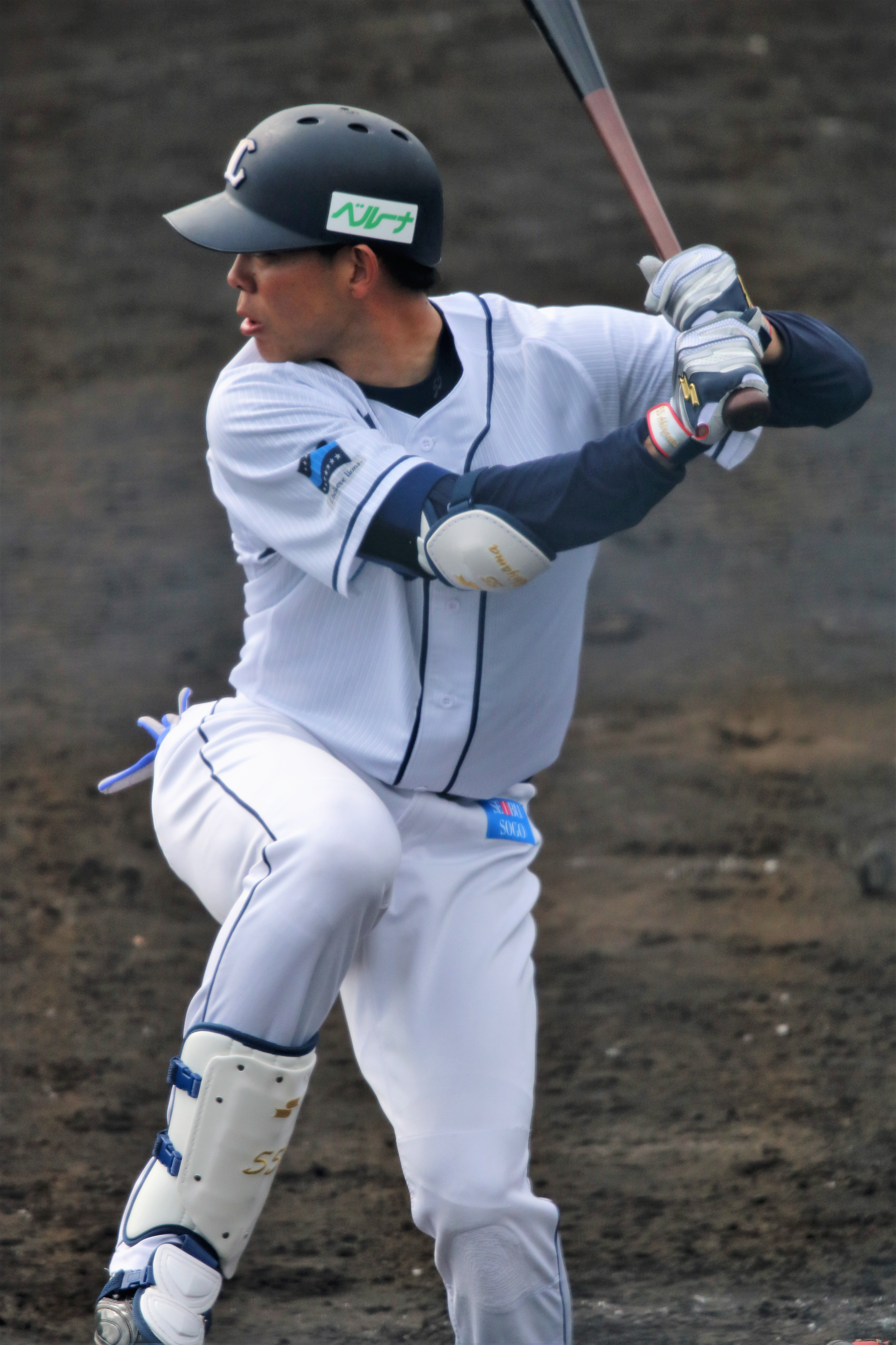 2018/2/9 宮崎・南郷キャンプ